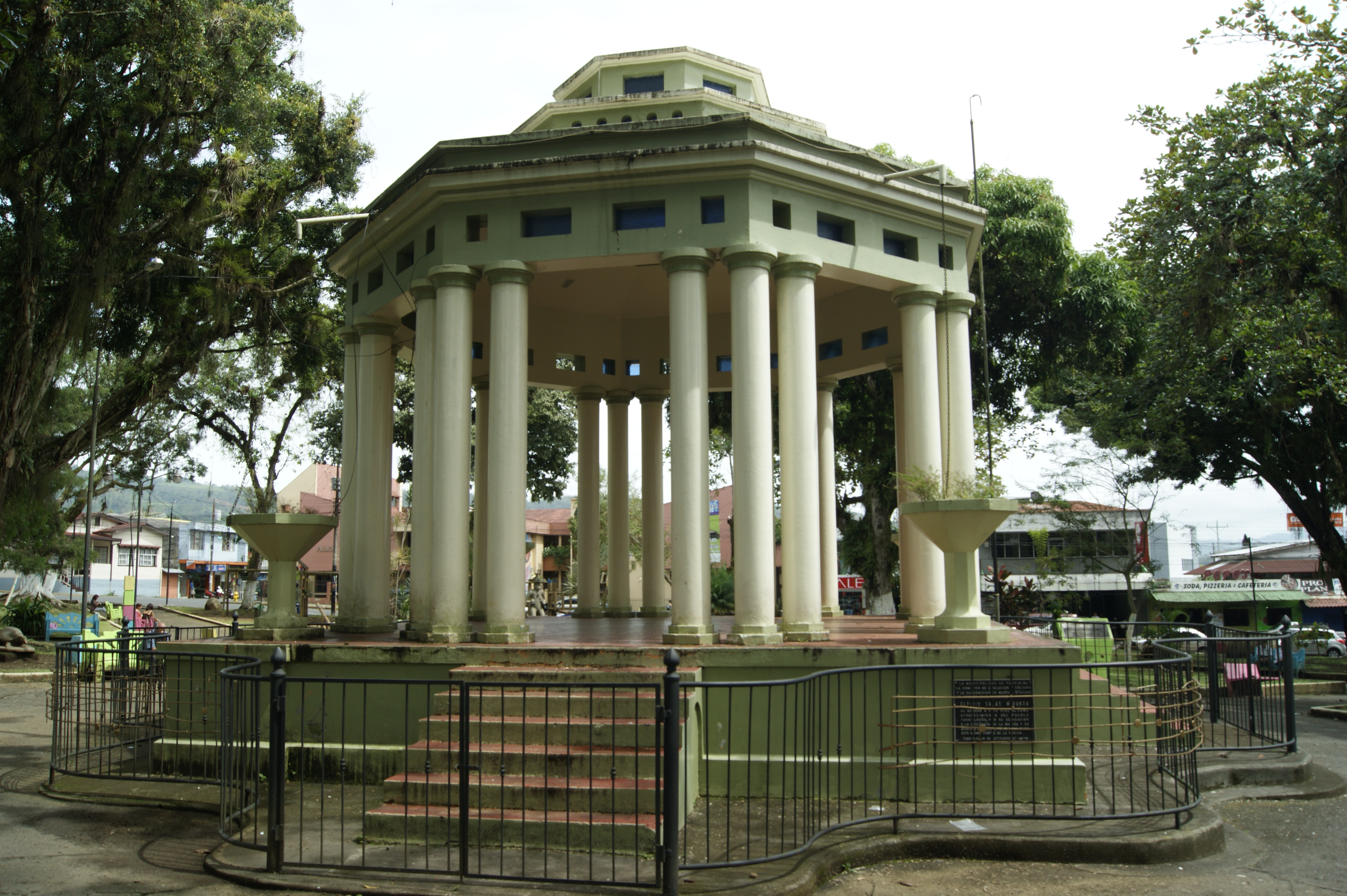 Kiosco del parque central de Turrialba.